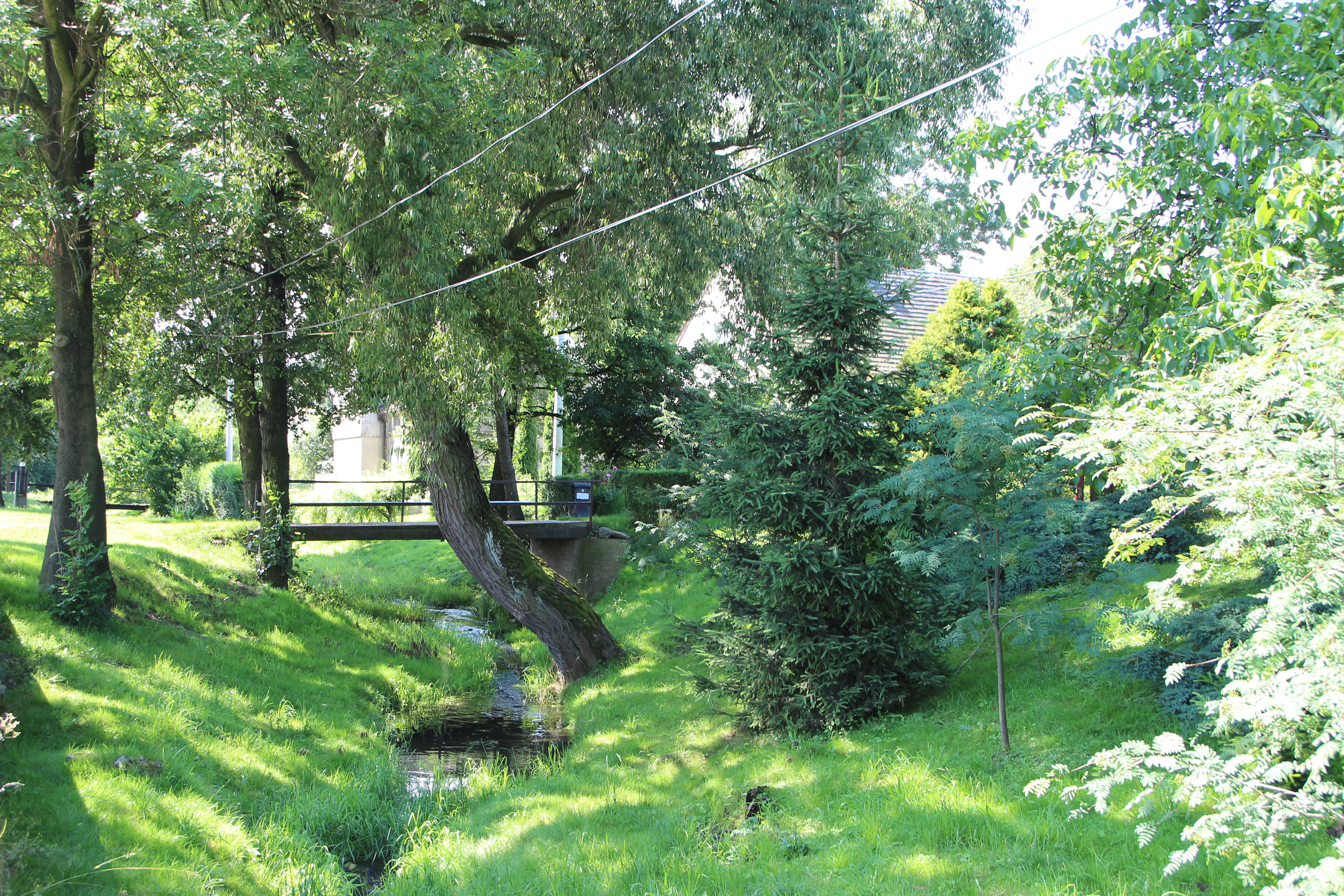 Stary Las - wieś w Polsce w opolskim, w powiecie nyskim, w gminie Nysa.